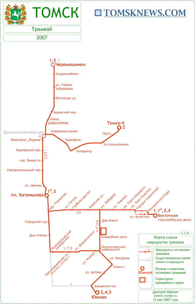 Map of Tomsk tram system; RU: Схема трамвайной сети Томска